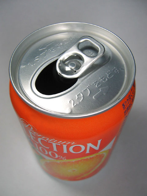 缶ジュースのja:プルトップ パーシャルオープンエンド・ステイオンタブ式のプルトップ アサヒ飲料 プレミアムセレクション・バヤリースオレンジ （商標部分を処理済） Contents 1 データ 2 関連画像 3 Licensing 4 Licensing 5 Original upload log データ 撮影者 Shift 撮影日 2005年08月 撮影地 自宅 関連画像 なし Licensing Category:飲料画像